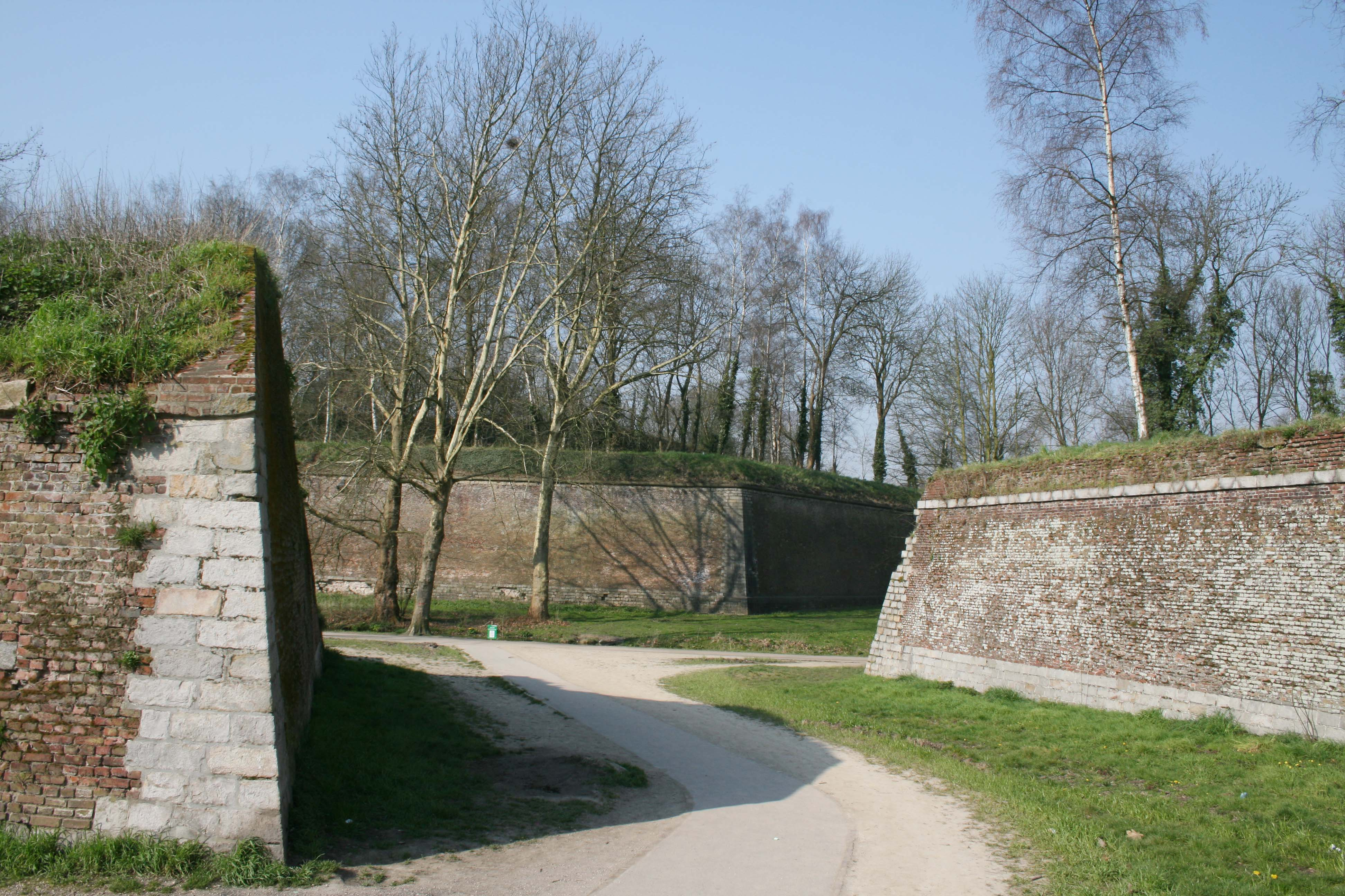 Fossé de la Citadelle Vauban à Lille